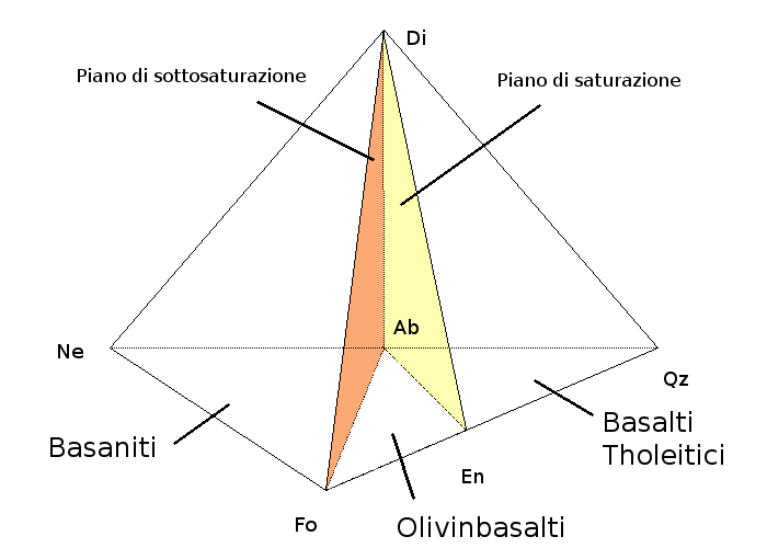 Tetraedro dei basalti